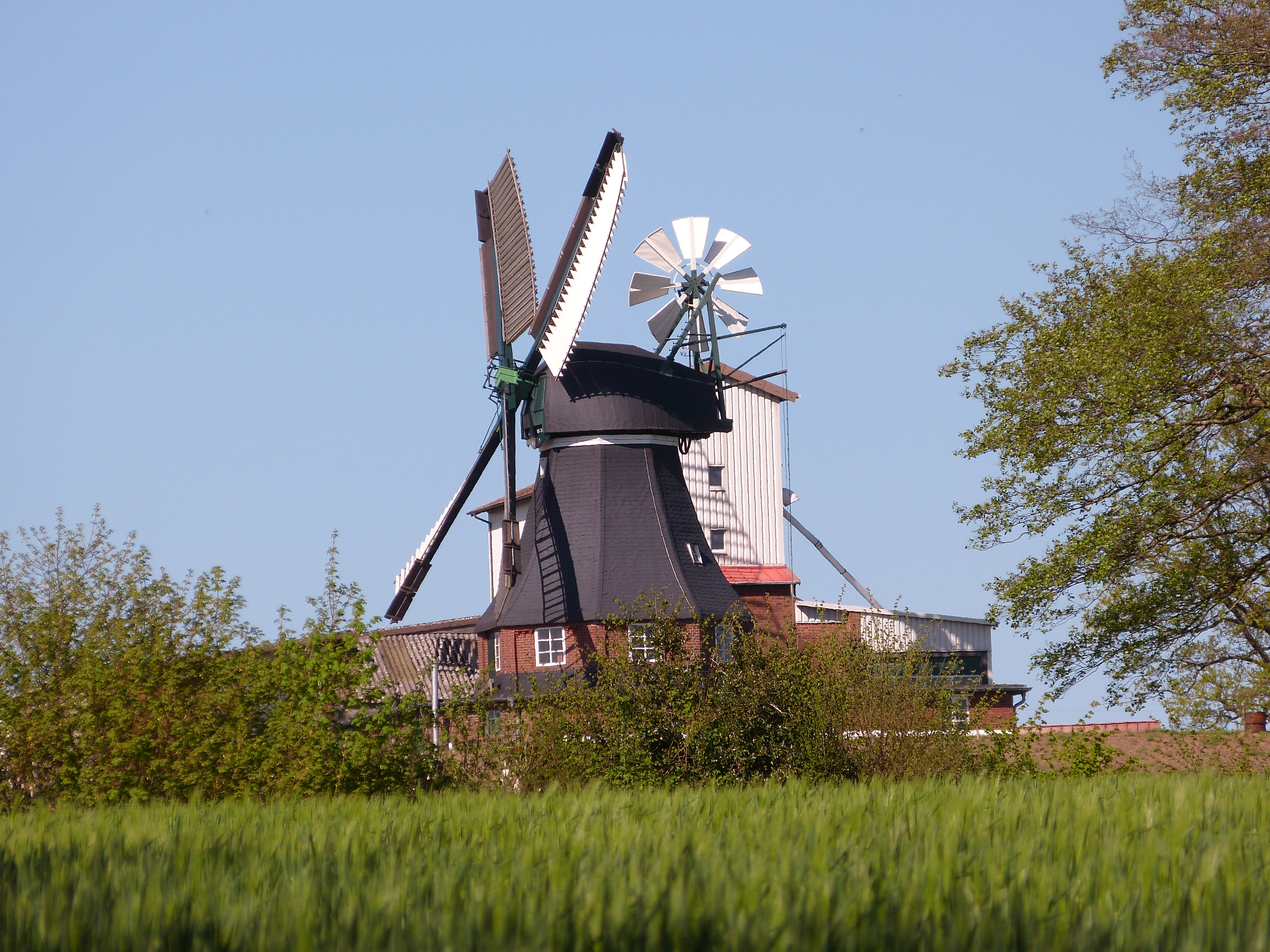 Die Götzberger Mühle in Henstedt-Ulzburg.